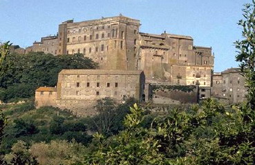 Chateau de Bomarzo